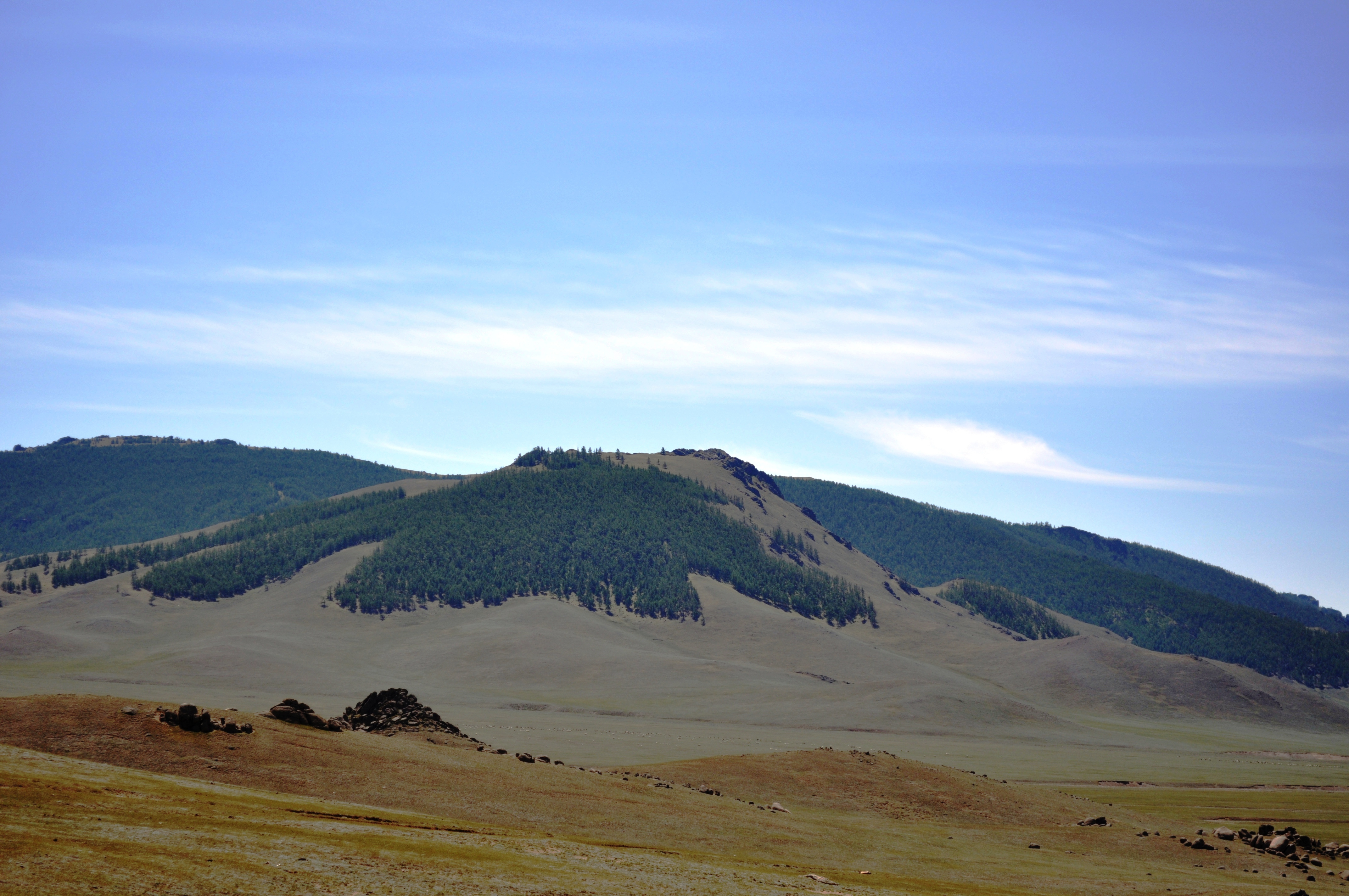 Монгол: цамц хэлбэртэй мод